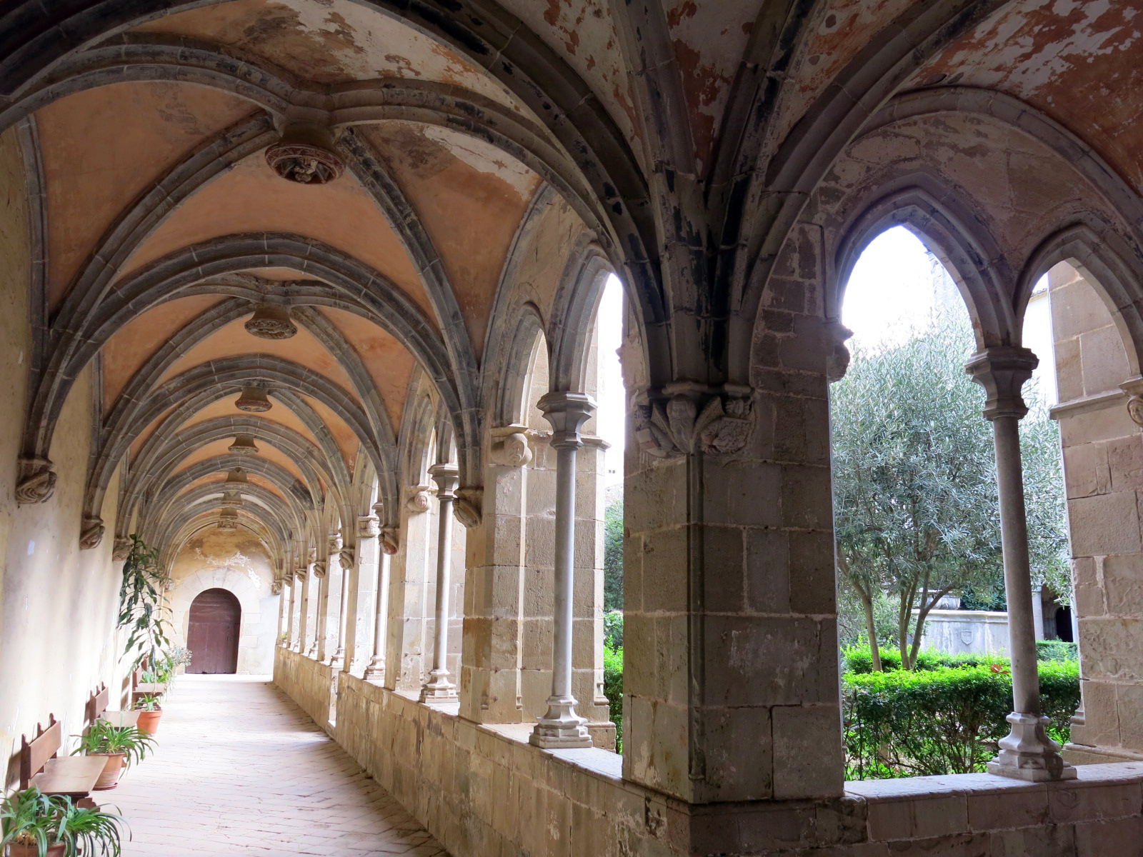 Monestir de Sant Jeroni de la Murtra (Badalona)